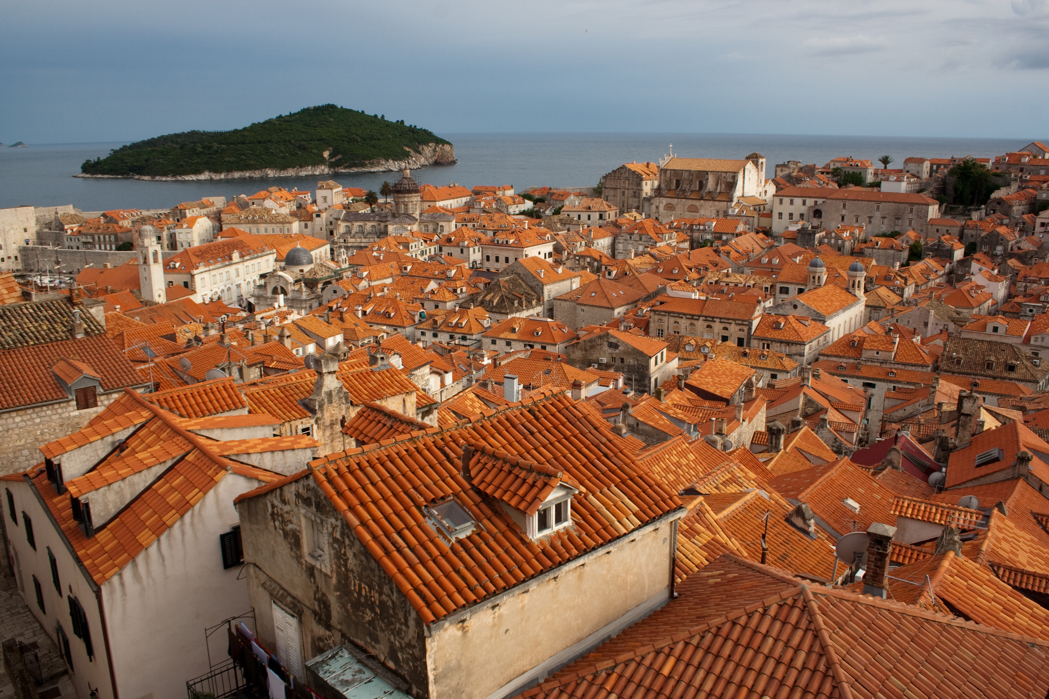 Vista panorámica de Dubrovnik